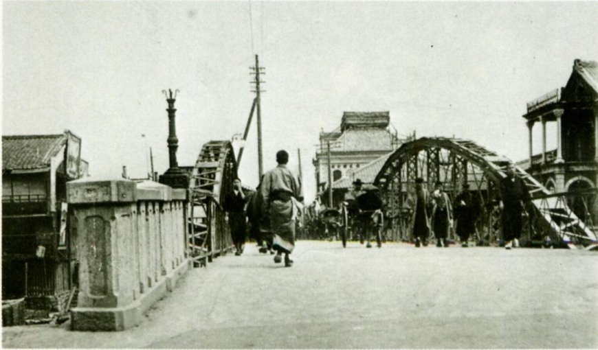 鉄橋時代の心斎橋。